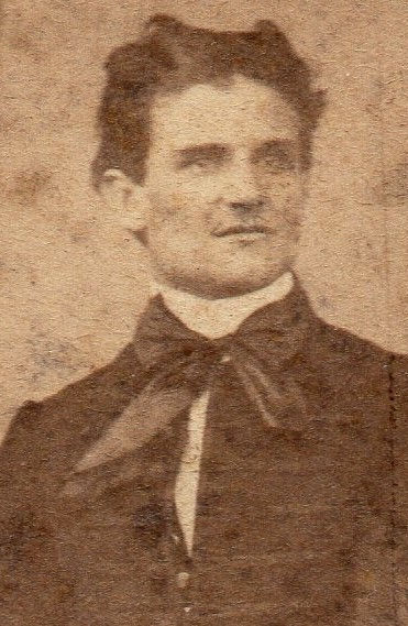 Mándoky Béla magyar színész, színházi rendező, színigazgató.